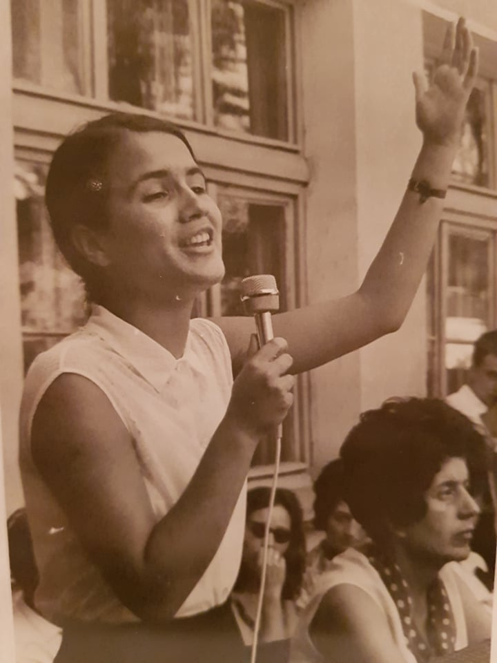 Kristin Yurukova stellt ein Gedicht bei einer Feier für Beginn von neuem Schuljahr